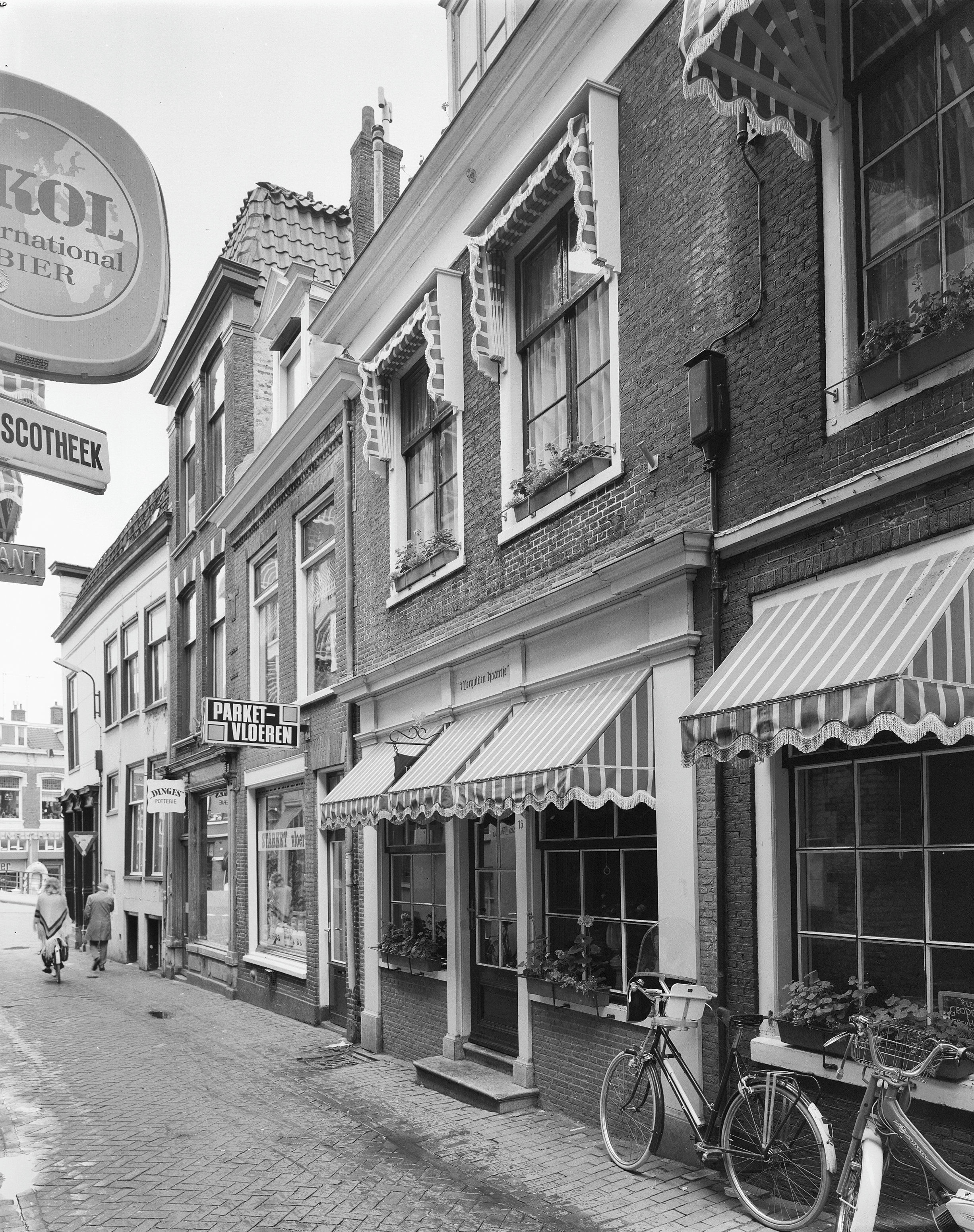 voorgevel